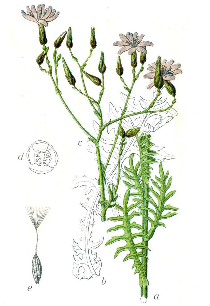 Lactuca perennis L. Original Caption Blauer Steinlattich, Lactuca perennis